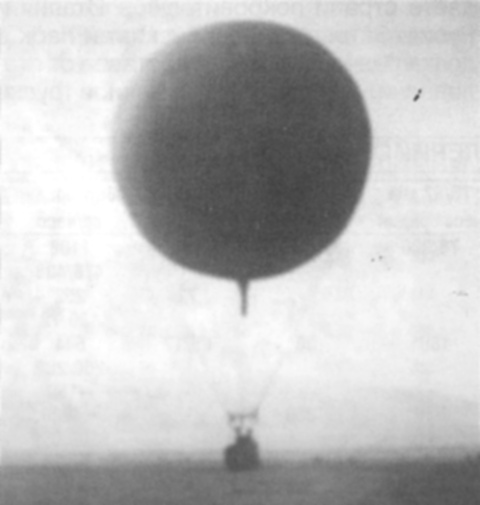 Наблюдателен балон на българската армия по време на обсадата на Одрин през Балканската война